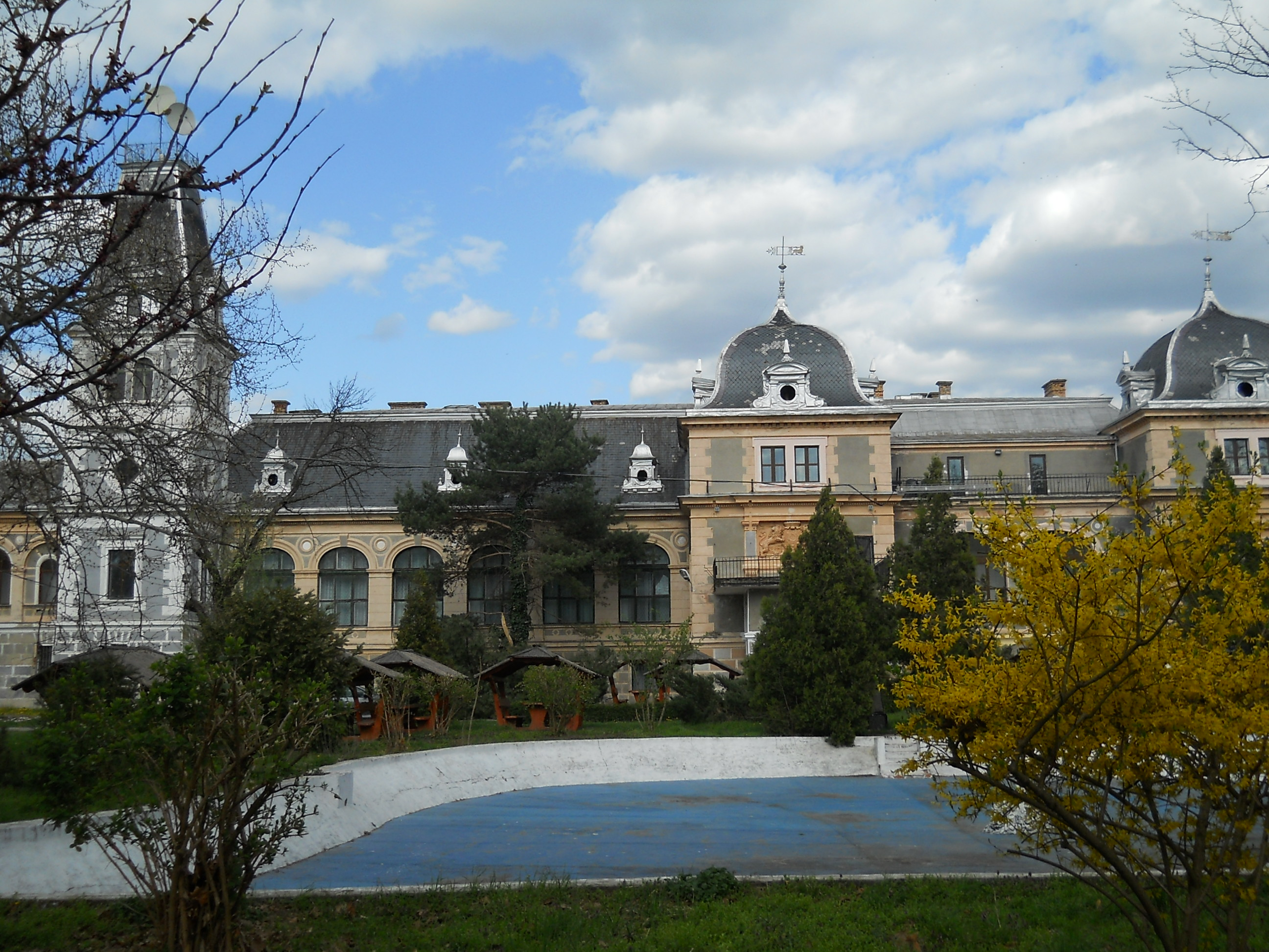 vedere de ansamblu a Castelului Csernovics 01